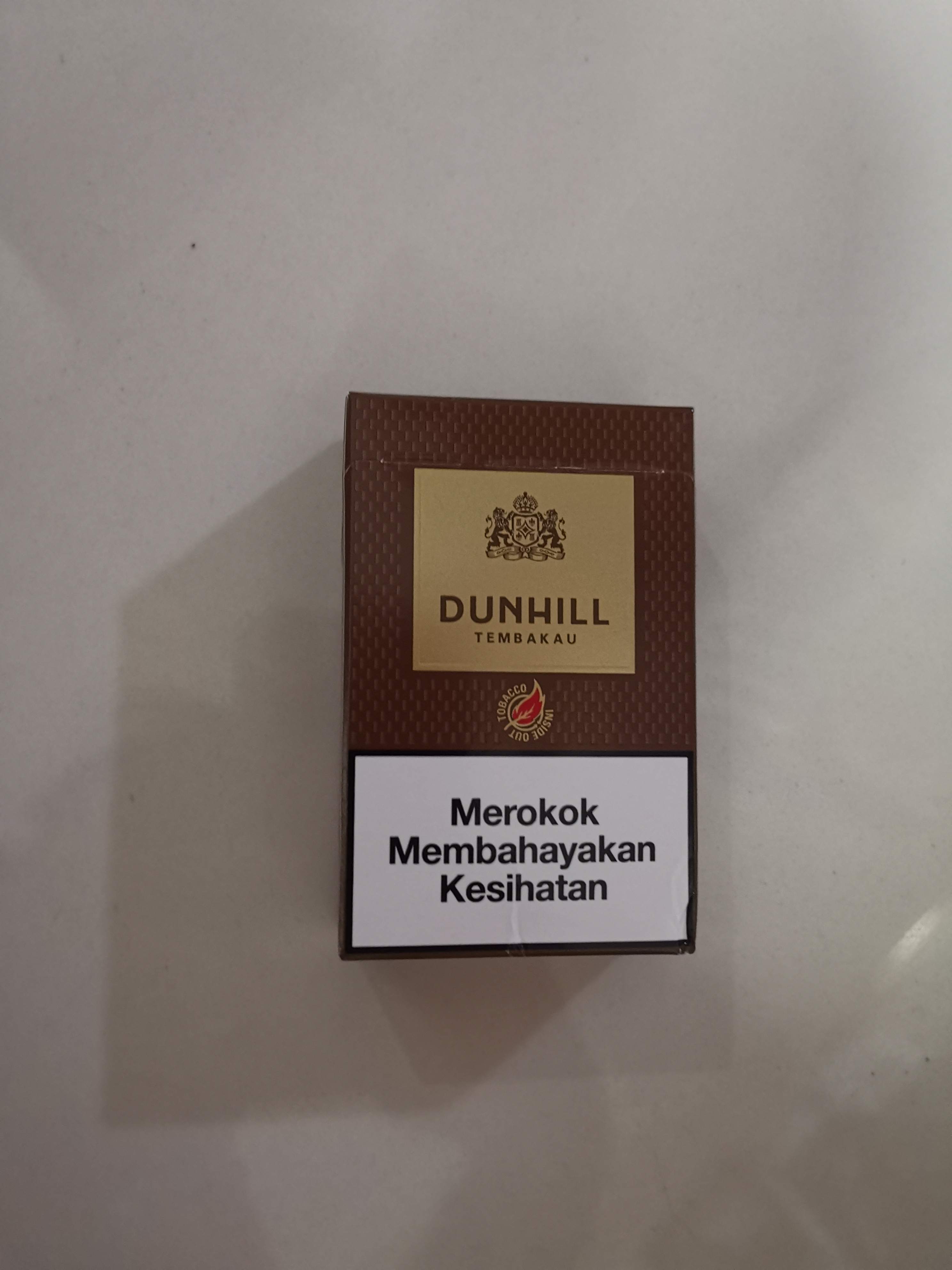 Shot this picture after purchasing it in Malaysia